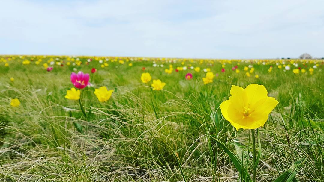 Ориентировочно в конце апреля – начала мая проводится фестиваль тюльпанов, направленный на привлечение внимания общественности на сохранение занесенных в Красную книгу России тюльпанов.